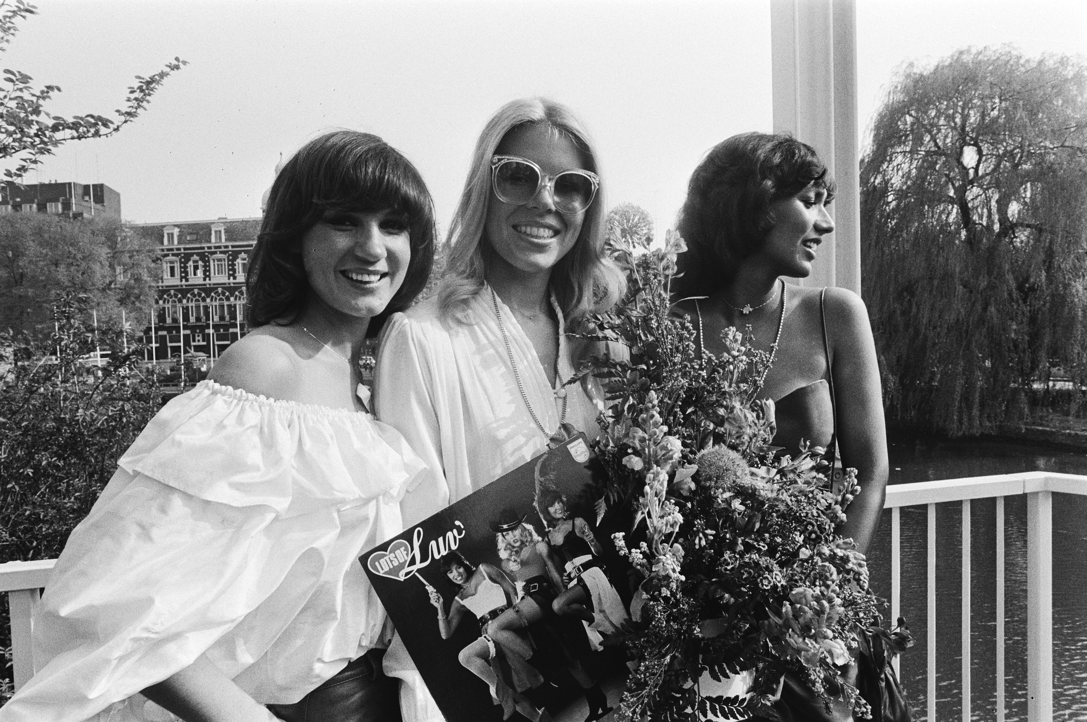 Collectie / Archief : Fotocollectie Anefo Reportage / Serie : Groep "Luv" krijgt gouden platen uit handen van Rijk de Gooyer Beschrijving : José Hoebee, Marga Scheide en Patty Brard Datum : 15 mei 1979 Trefwoorden : grammofoonplaten, muziek, popgroepen, prijzen, zangeressen Persoonsnaam : Brard, Patty, Hoebee, José, Scheide, Marga Fotograaf : Dijk, Hans van / Anefo Auteursrechthebbende : Nationaal Archief Materiaalsoort : Negatief (zwart/wit) Nummer archiefinventaris : bekijk toegang 2.24.01.05 Bestanddeelnummer : 930-2665 Reacties Geplaatst door Maaike op 13 oktober 2012 - 19:29. Locatie: het Lido te Amsterdam